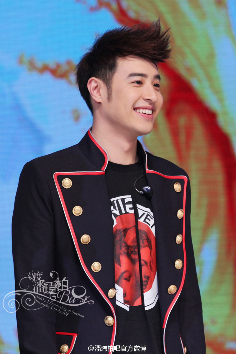 Phan Vỹ Bá - Fanmeeting tại Tô Châu ngày 12/06/2013